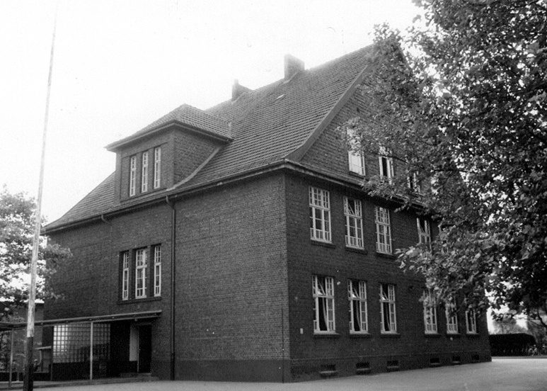 Scann von einem Bild Pestalozzischule Duisburg im Jahre 1958. Die heutige Grundschule diente damals dem ersten 5er Jahrgang der Realschule Rheinhausen als Unterrichtsgebäude